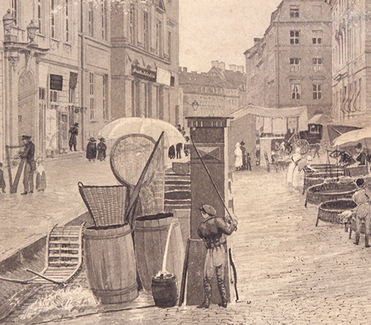 Handzeichnung aus der Sammlung der Stiftung Stadtmuseum Berlin Künstler: Eduard Gaertner Titel: Der Köllnische Fischmarkt (Das Cöllnische Rathaus)